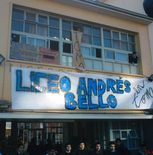 toma del liceo andres bello